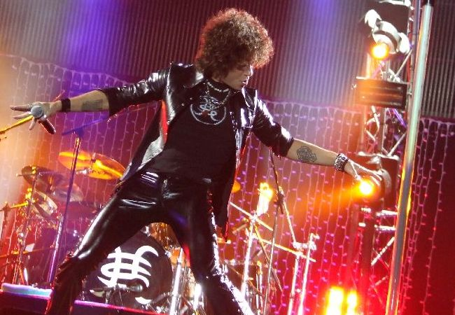 Enrique Bunbury, durante el concierto de Héroes del Silencio en el Estadio de La Cartuja de Sevilla el 20 de octubre de 2007